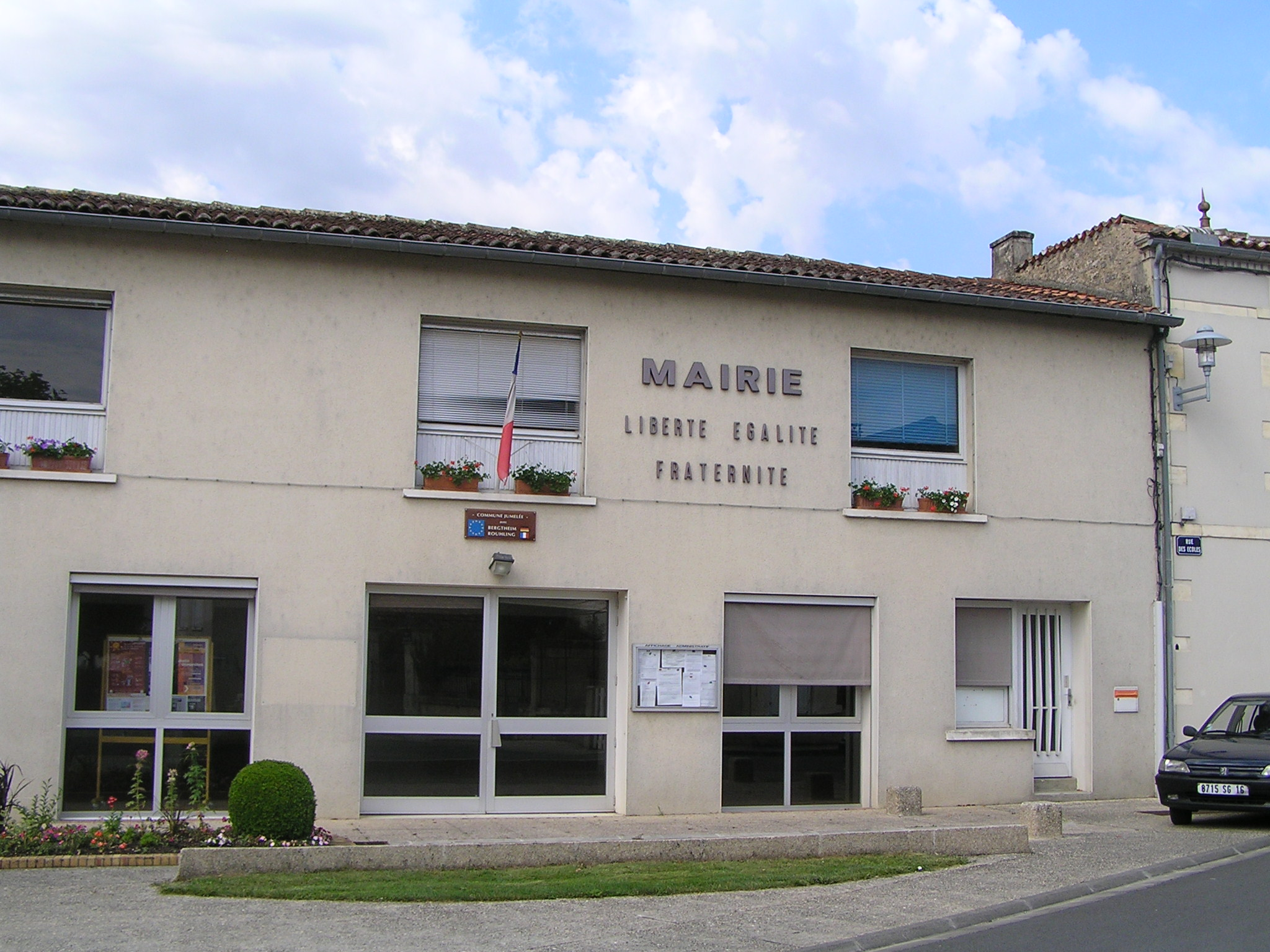 mairie de Boutiers